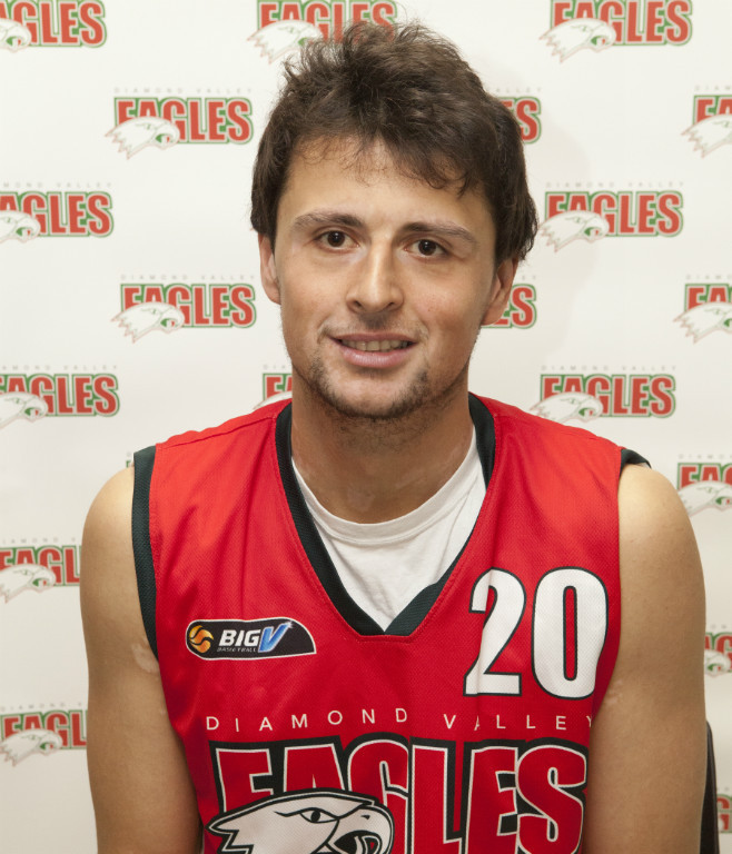 Nikolina slika